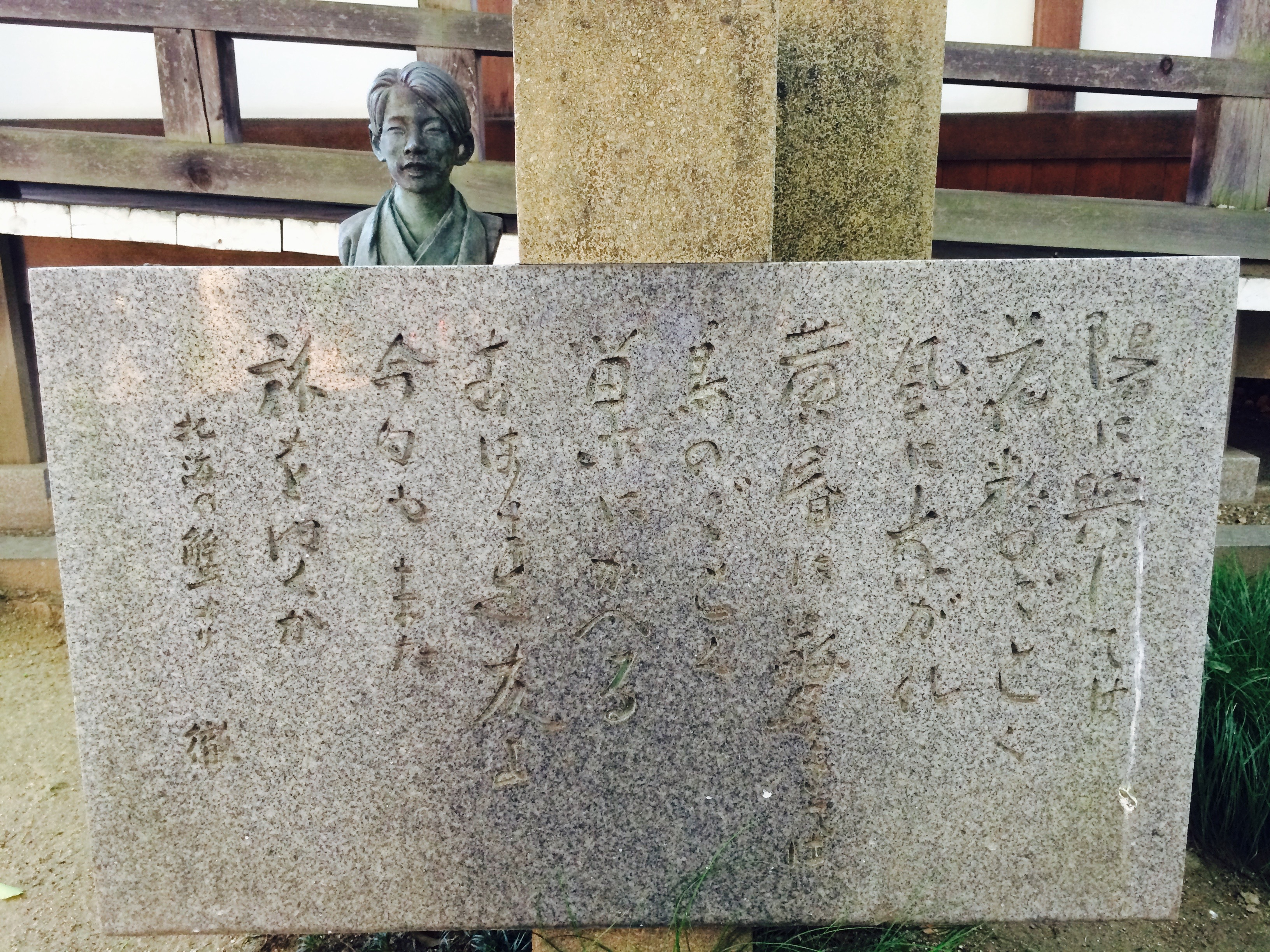 大塚徹 顕彰歌碑 北海の蟹 播磨国総社